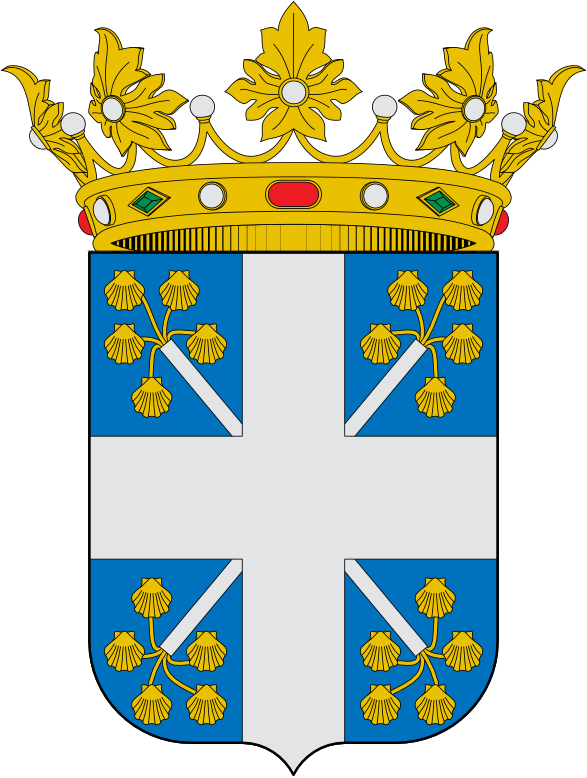 Escudo de Cortes y Graena, en Granada (España)